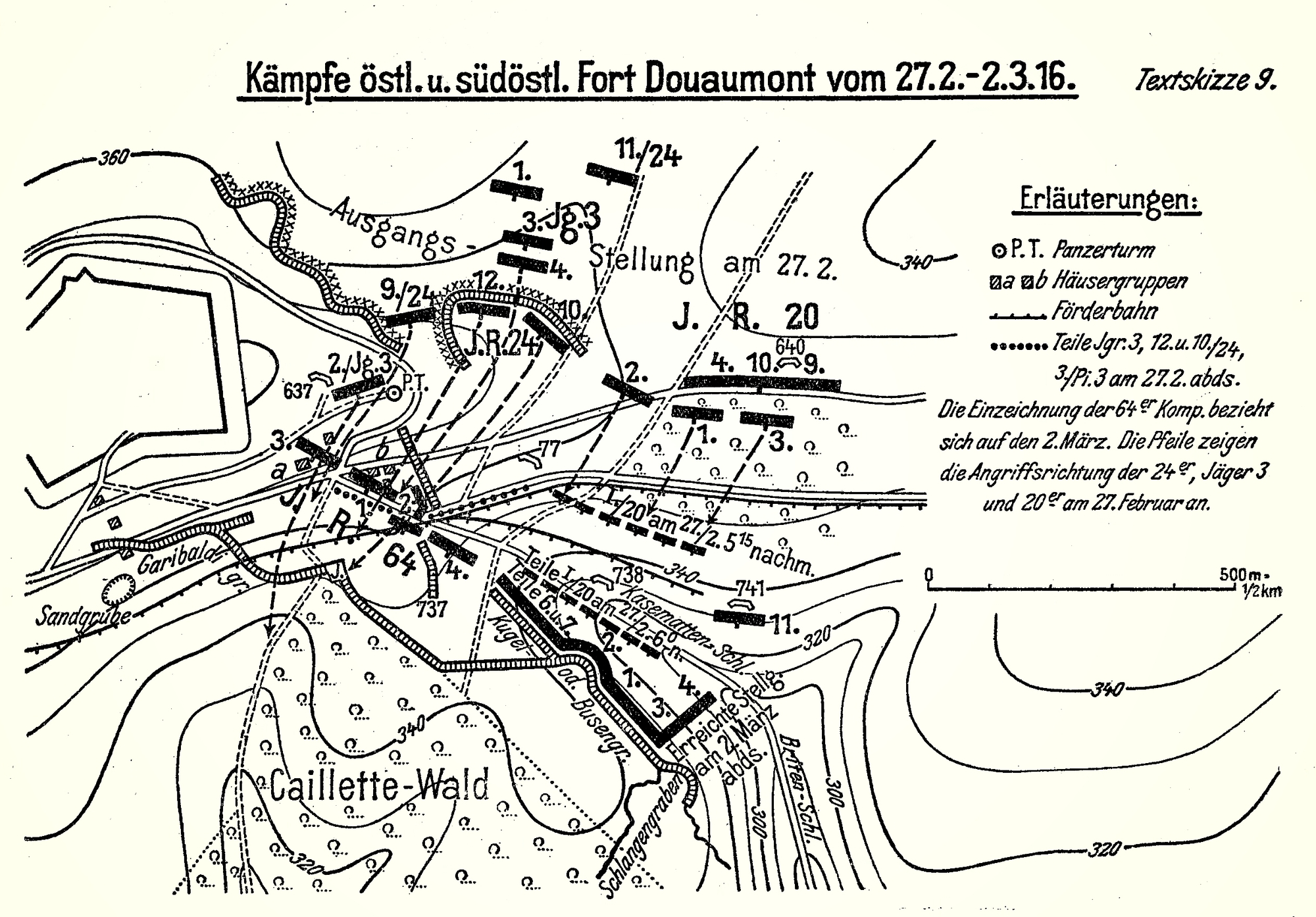 Karte: Kämpfe östlich und südöstlich von Fort Douaumont vom 27. Februar bis 2. März 1916.